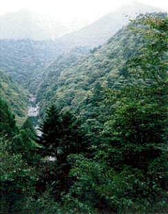 river